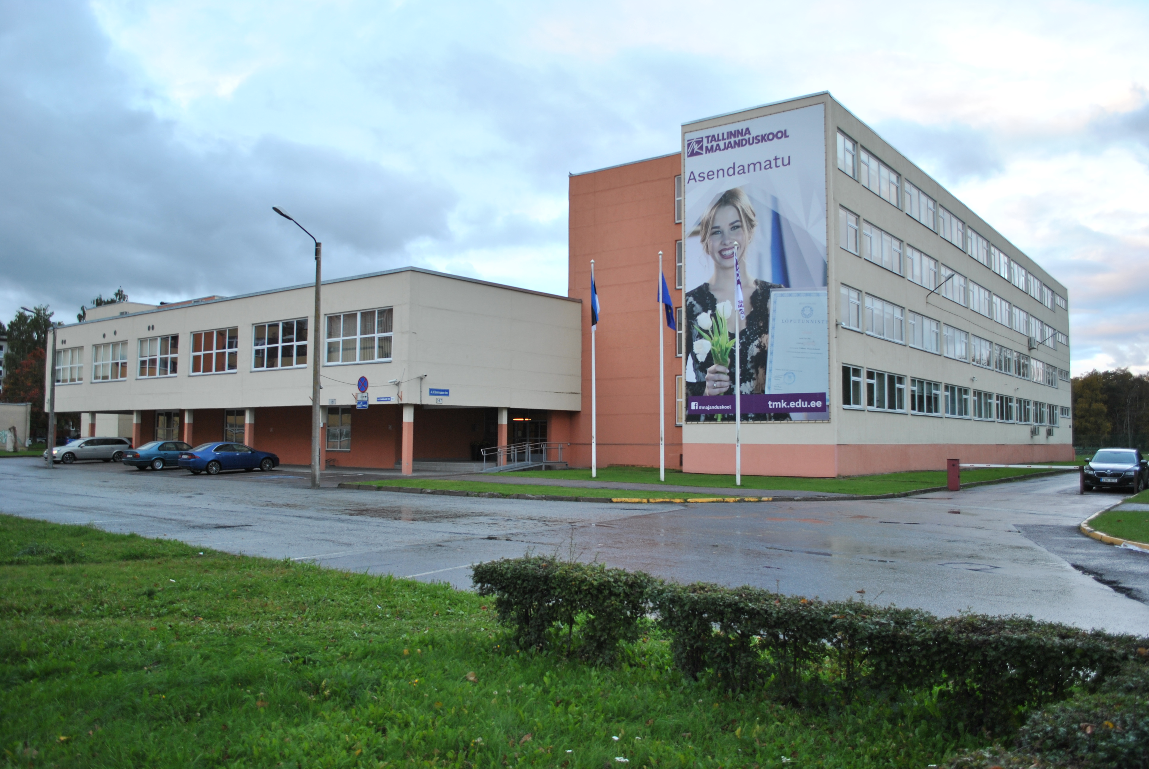 Uuendatud sümboolika ja reklaamiga